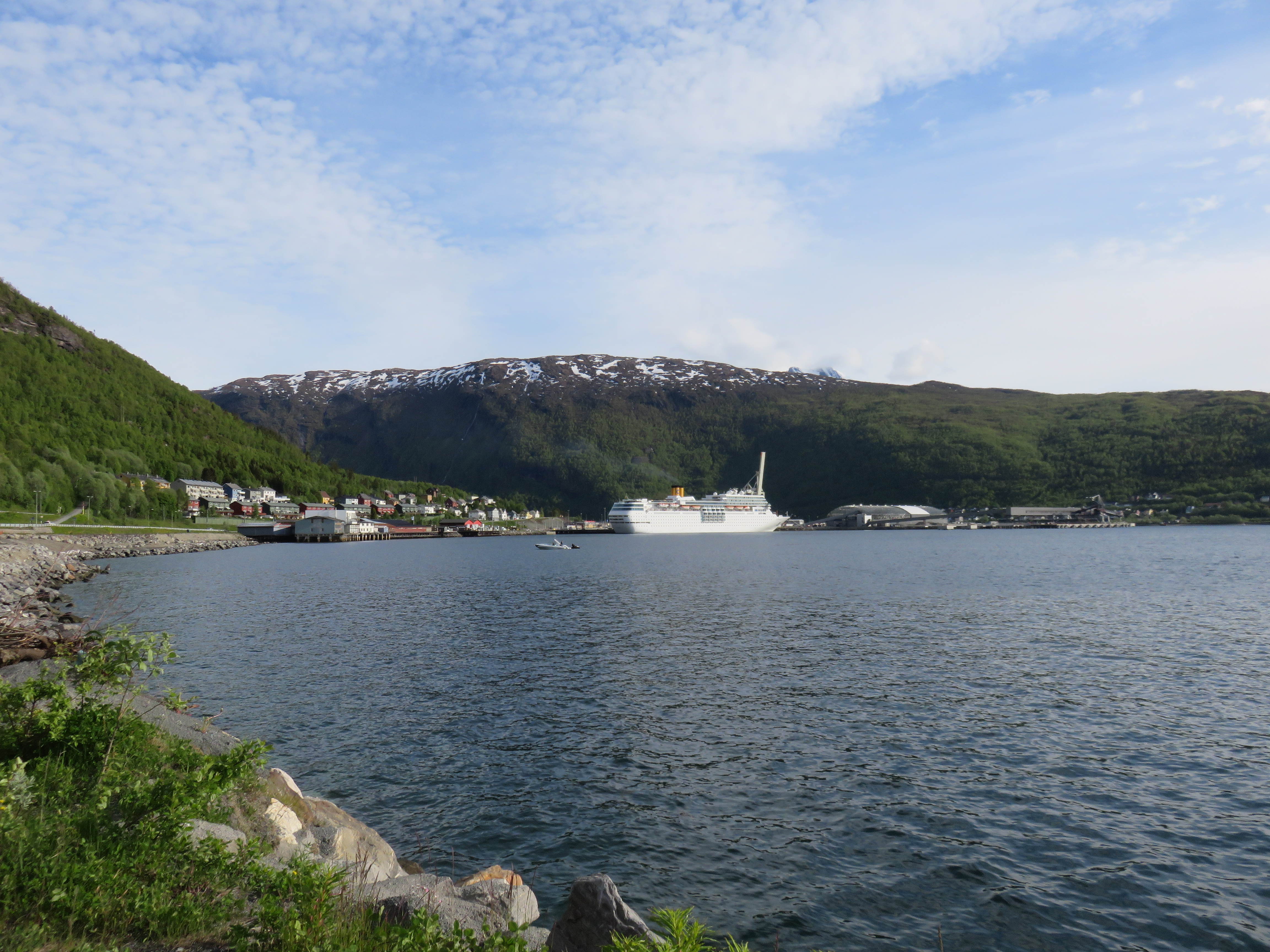 Fagernes, Narvik. Cruise-/containerhavn. Northland Resources' malmutskipningshall/-anlegg. "Skrenten". Til kai: Costa neoRomantica.